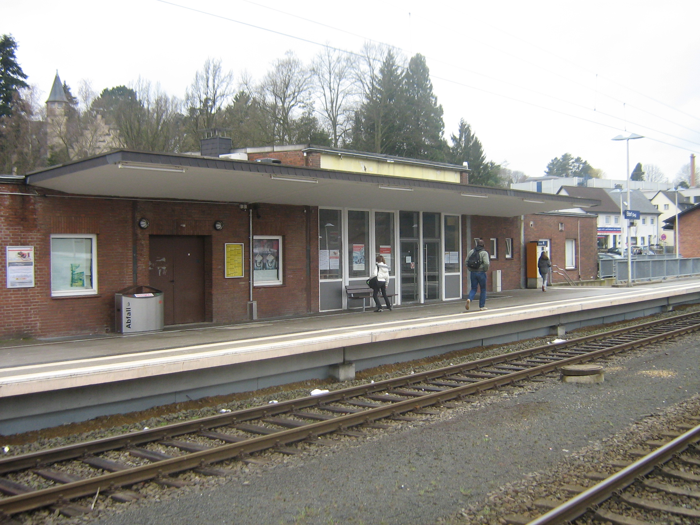 Bahnsteig in Eitorf